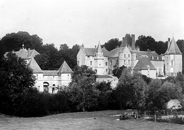 Château d' Alincourt par Félix Martin-Sabon